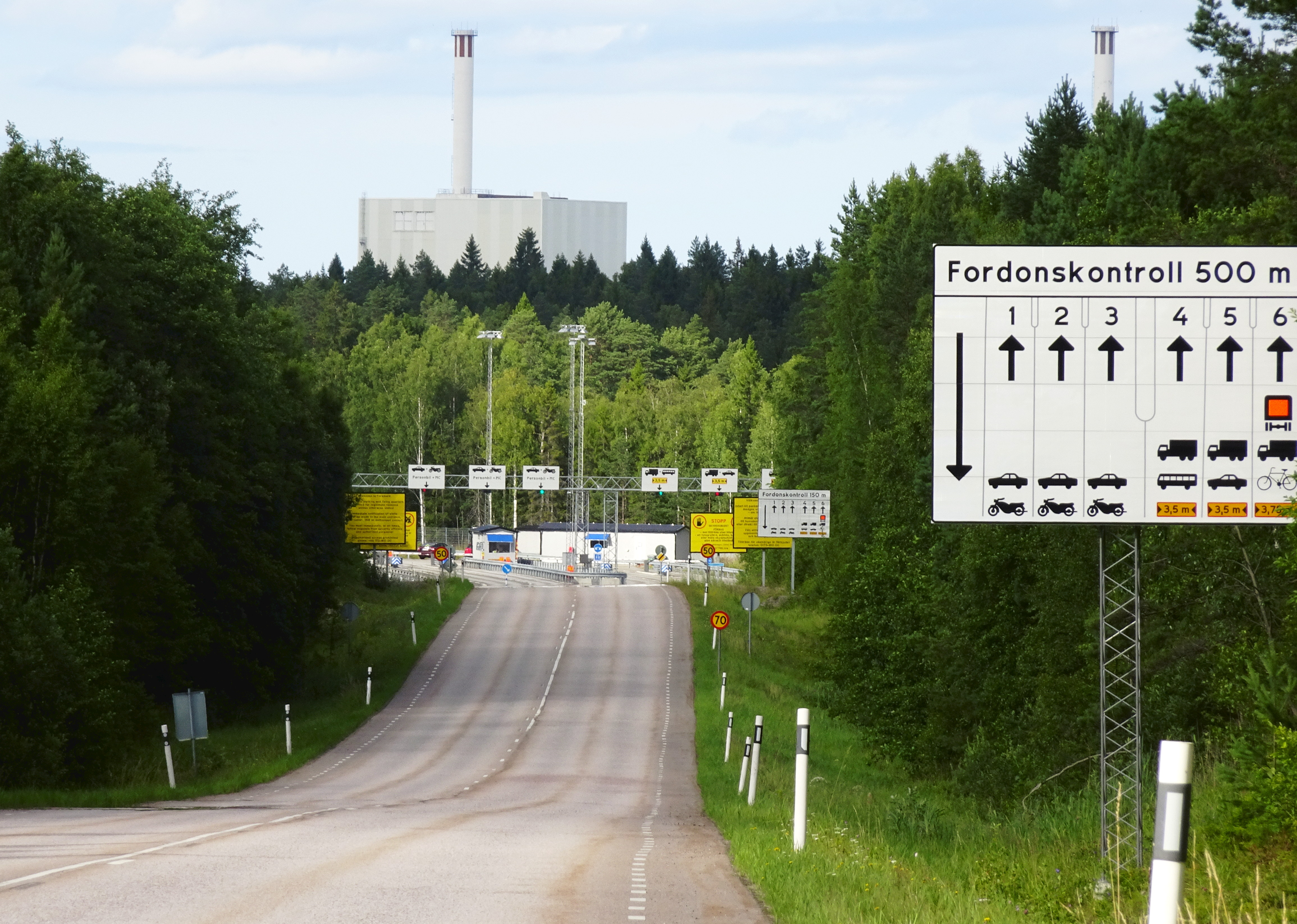 Forsmarks kraftverk, fordonskontroll